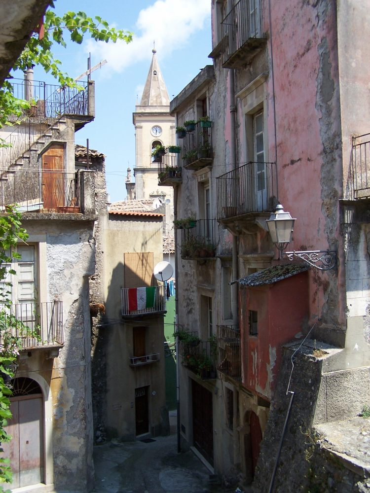 Novara di Sicilia, Italy